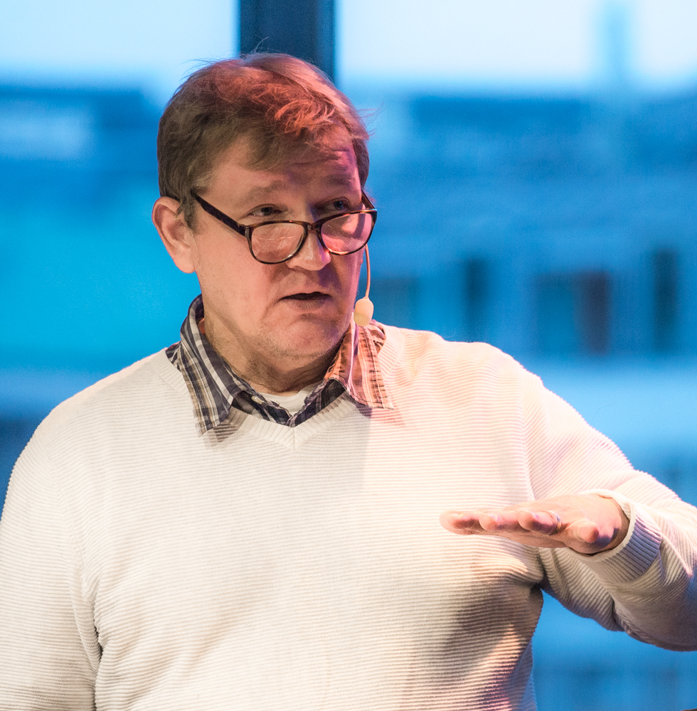 Roland Poirier Martinsson, konservativ filosof och kolumnist i tidningen Metro, under debattsamtalet "En ny politisk karta - Sverige fram till 2022" på Kulturhuset Stadsteatern i Stockholm den 25 september 2018.